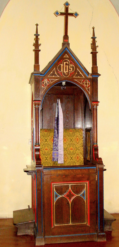 Kamienna Góra, kościół par. p.w. śś. Piotra i Pawła, XVI